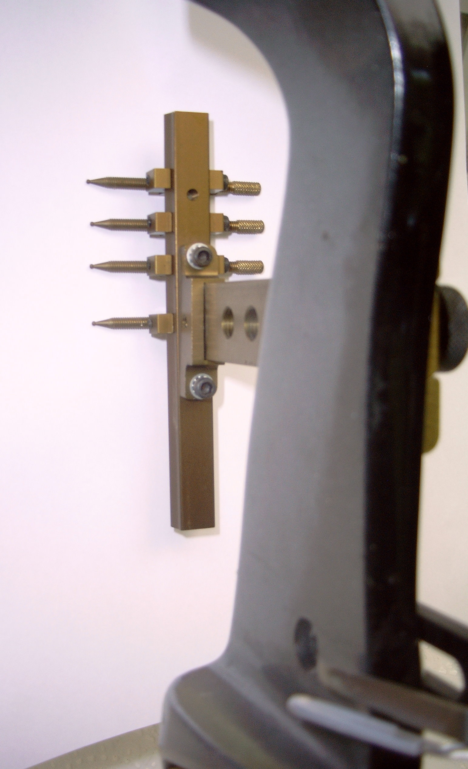 Pinvisier